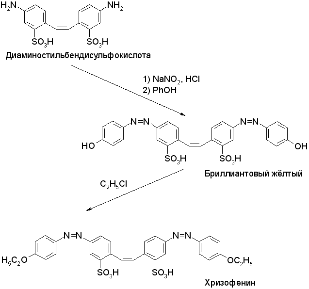 Схема синтеза азокрасителей Бриллиантового жёлтого и Хризофенина из полупродуктов